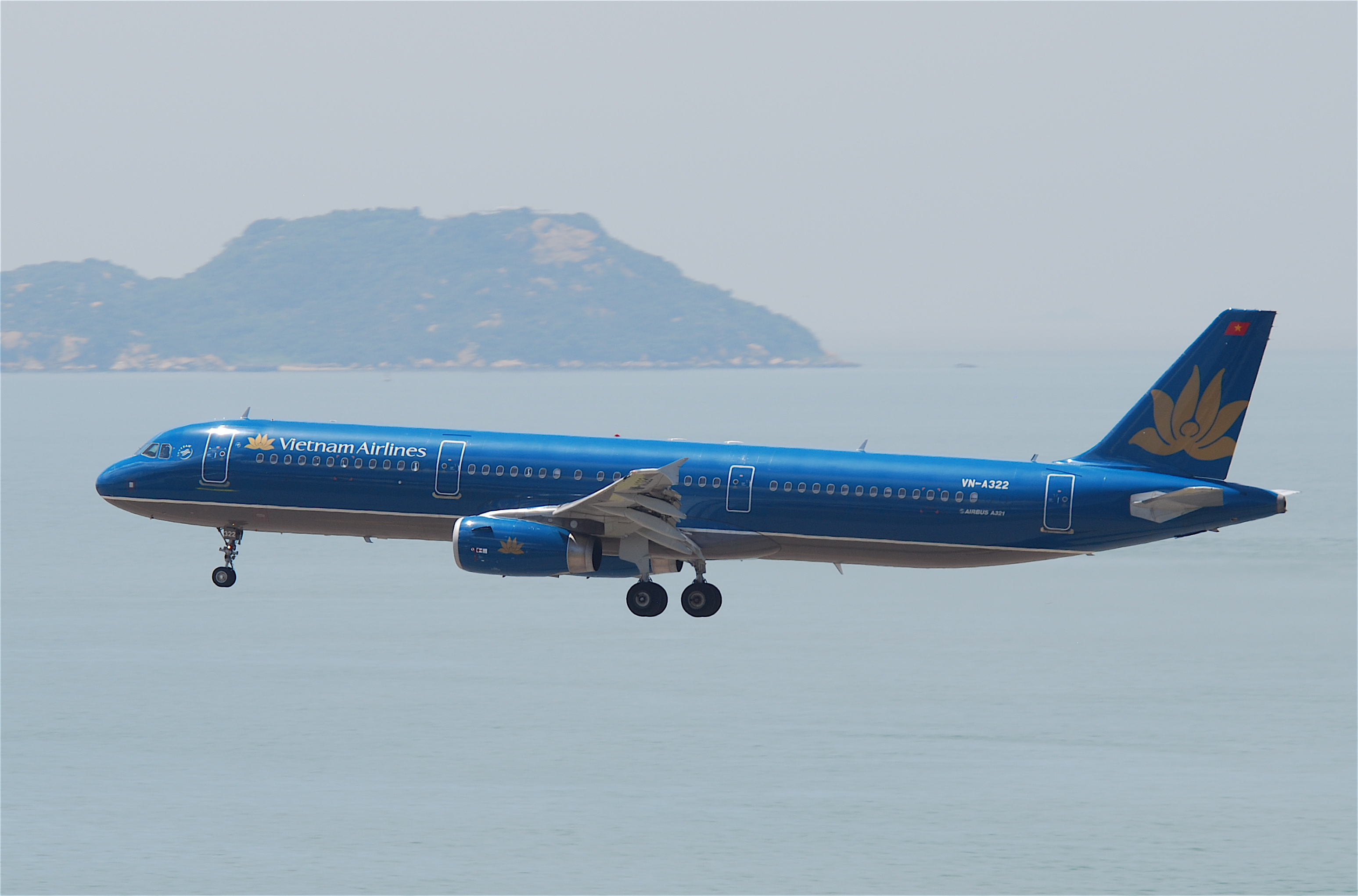 Vietnam Airlines Airbus A321-231; VN-A322@HKG;31.07.2011/614mq